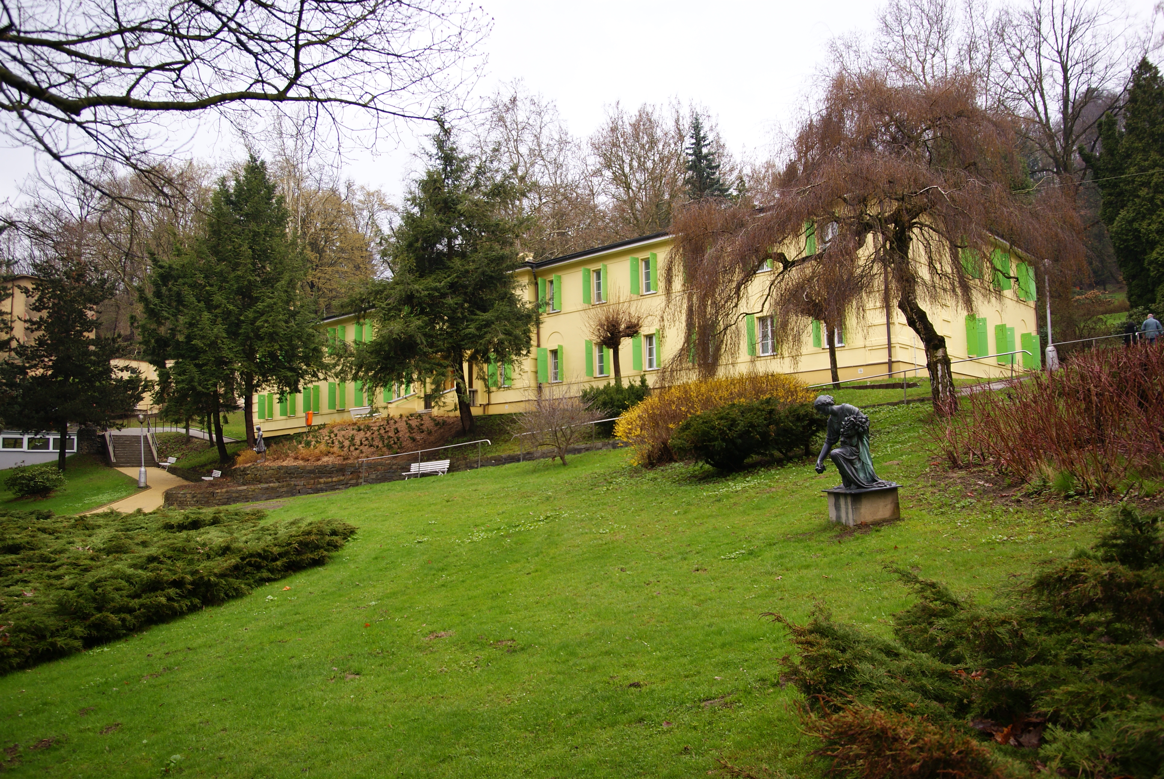 Lázeňský park (Teplice nad Bečvou), údolí řeky Bečvy, k. ú. Hranice a Teplice nad Bečvou, Teplice nad Bečvou